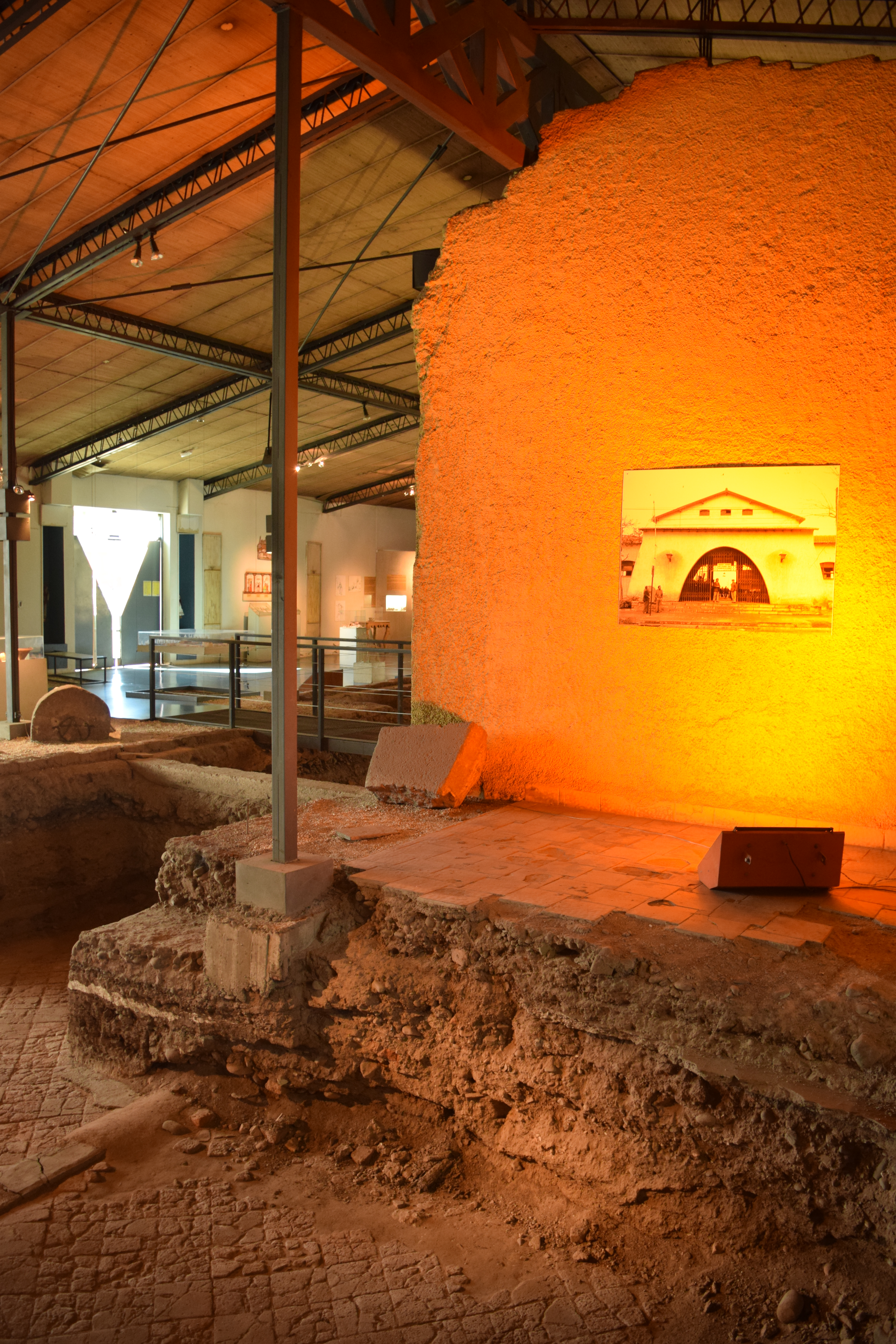 Interior del Museo del Área Fundacional de la ciudad de Mendoza. En el lugar estuvo primeramente ubicado el Cabildo hasta su destrucción por el terremoto de 1868, luego el matadero desde 1877 y la feria municipal desde 1930. A partir de 1993, se construye el Museo, junto a la Plaza Pedro del Castillo.